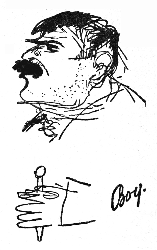 Karykatura Tadeusza Boya-Żeleńskiego